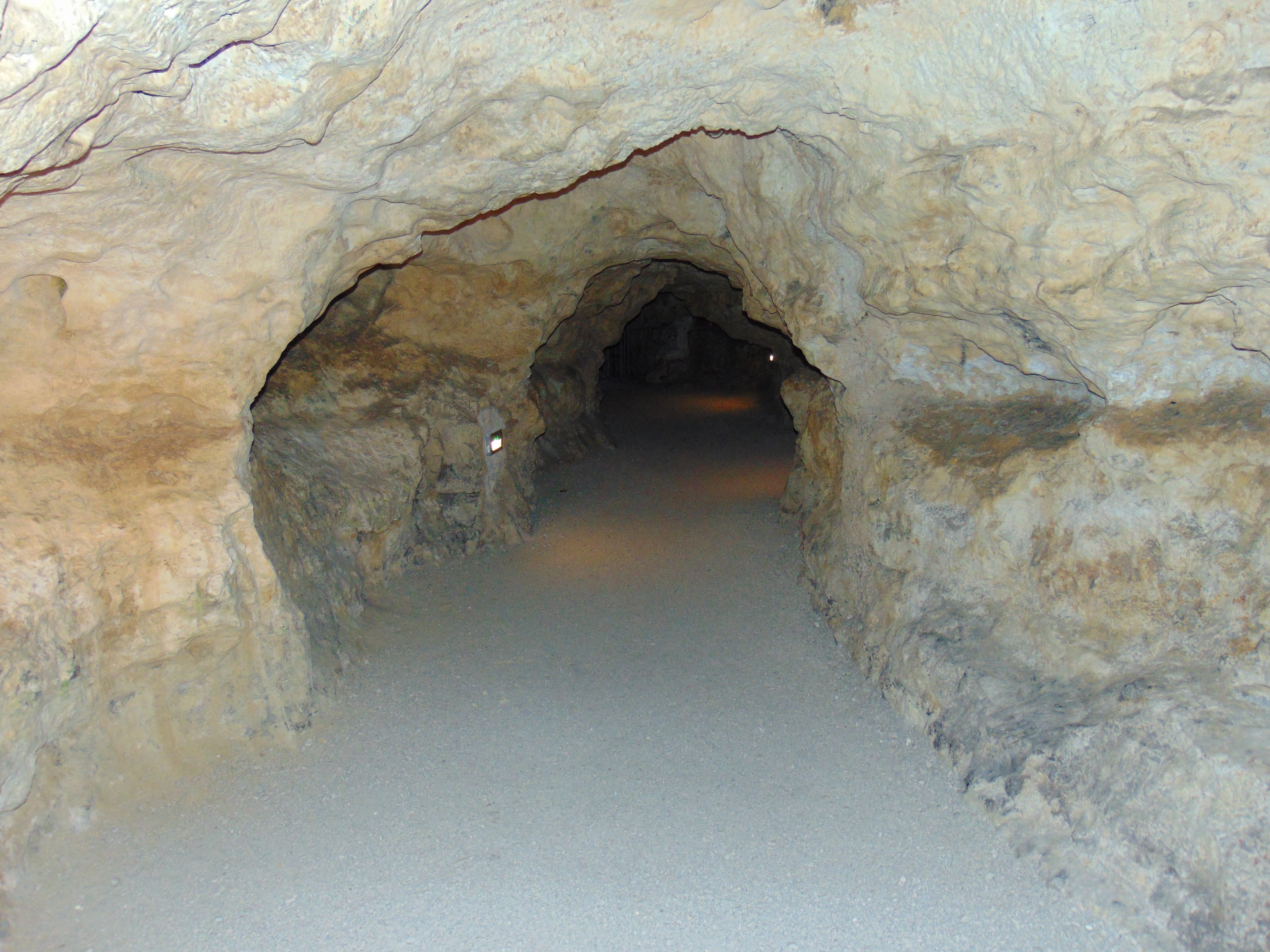 A Tapolcai-tavasbarlang egy száraz lábbal járható szakasza